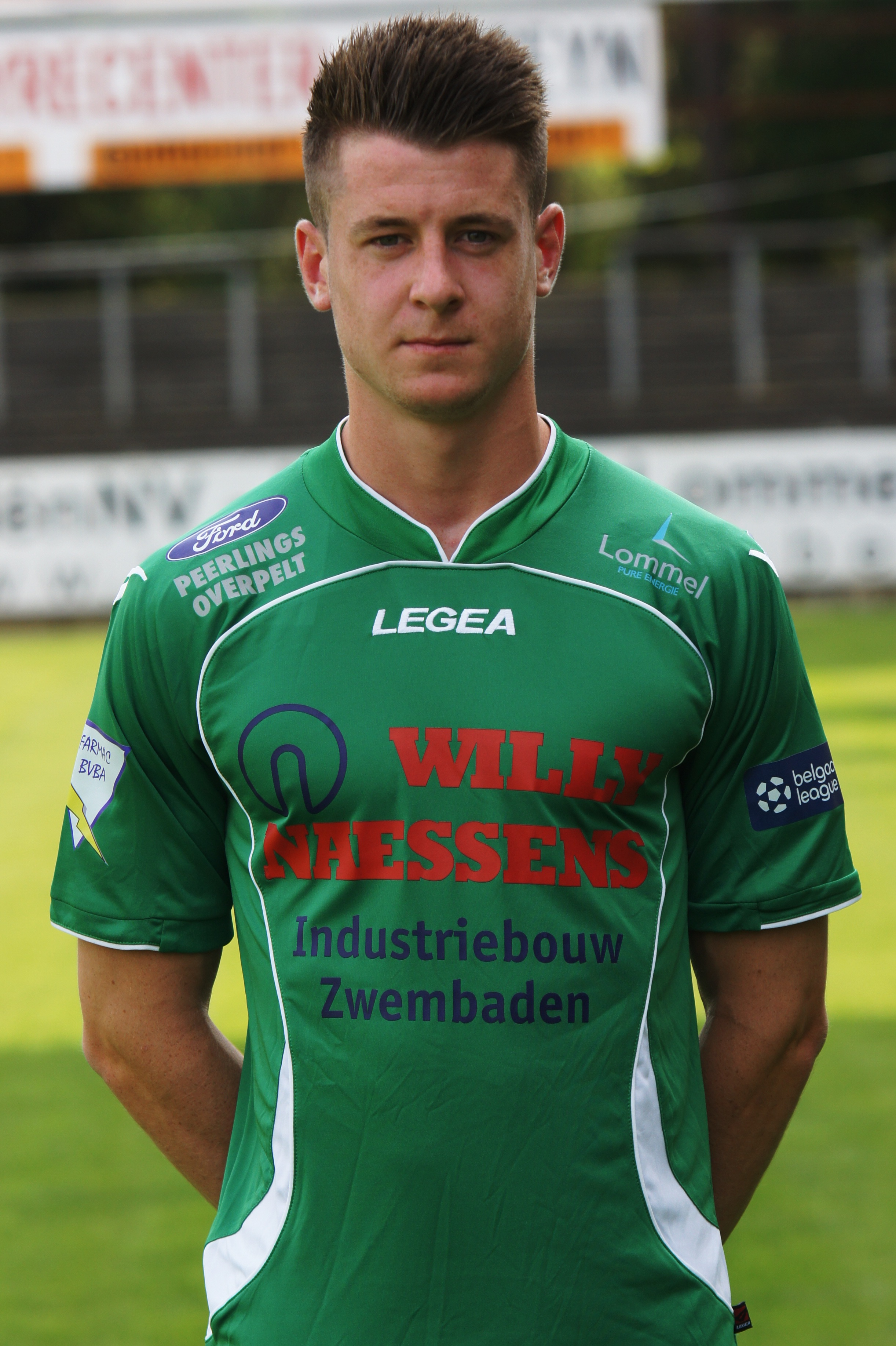 Profielfoto Niels Bongaerts